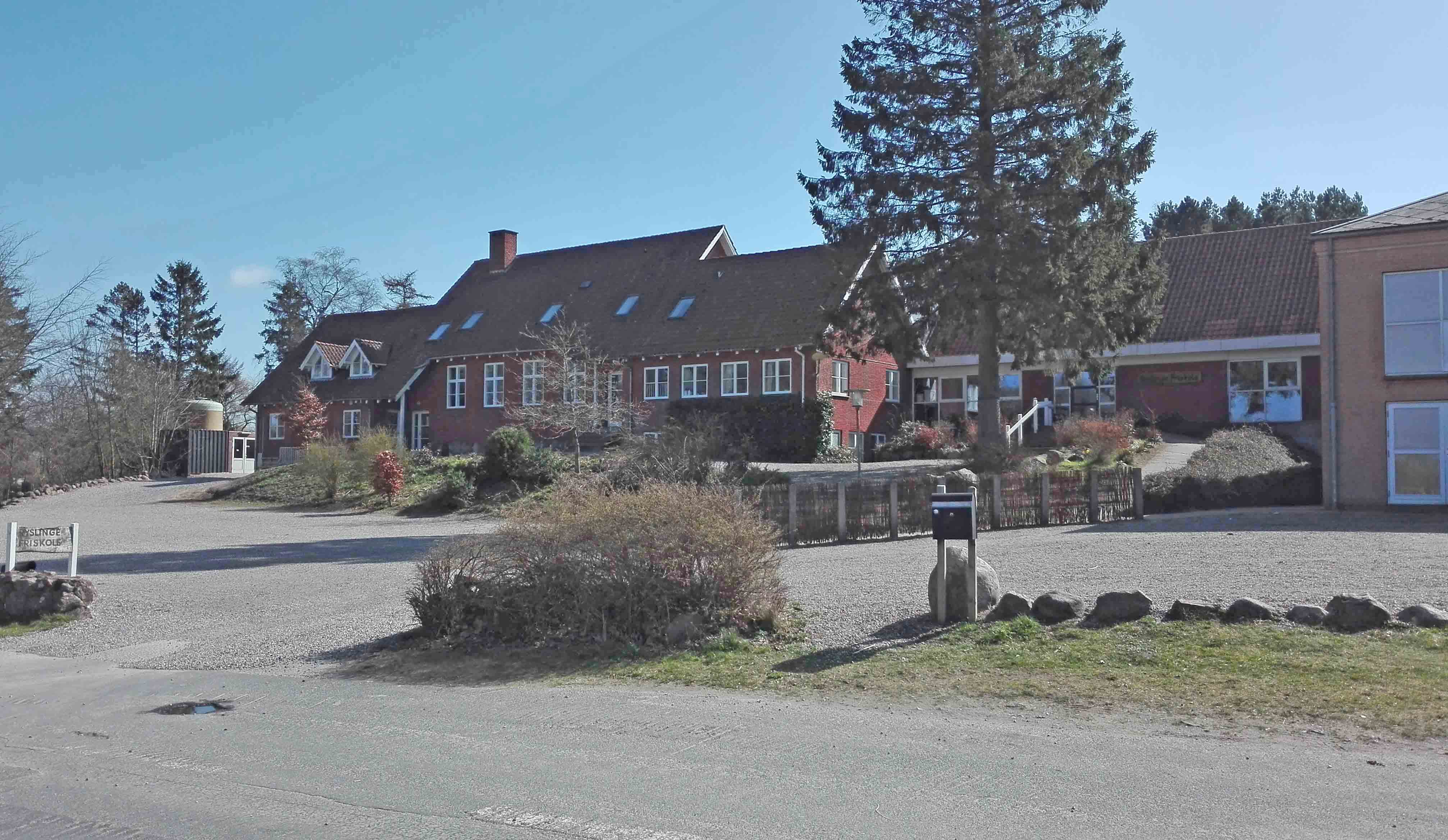 Ryslinge Friskole